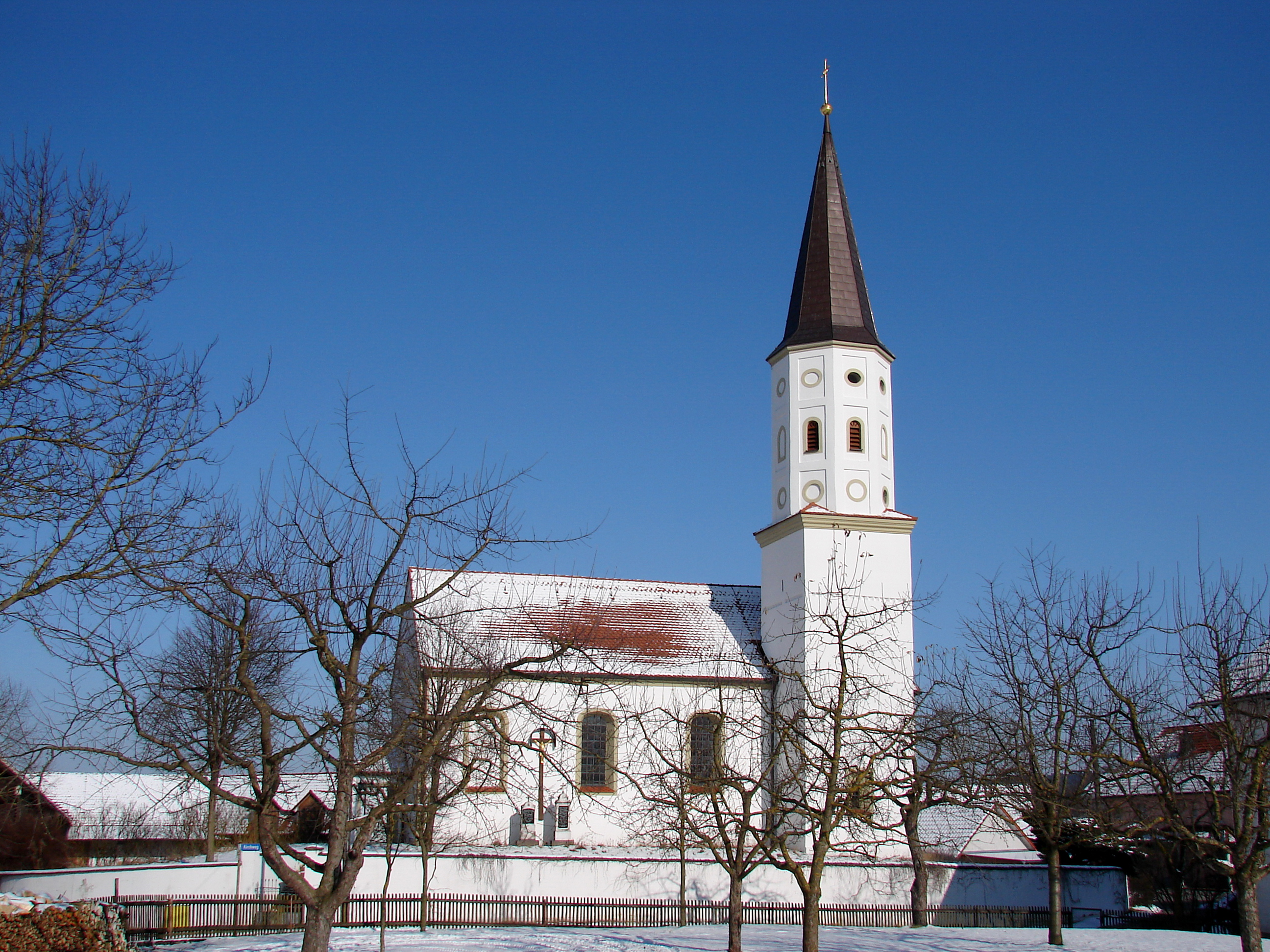 Kath. Filialkirche St. Andreas